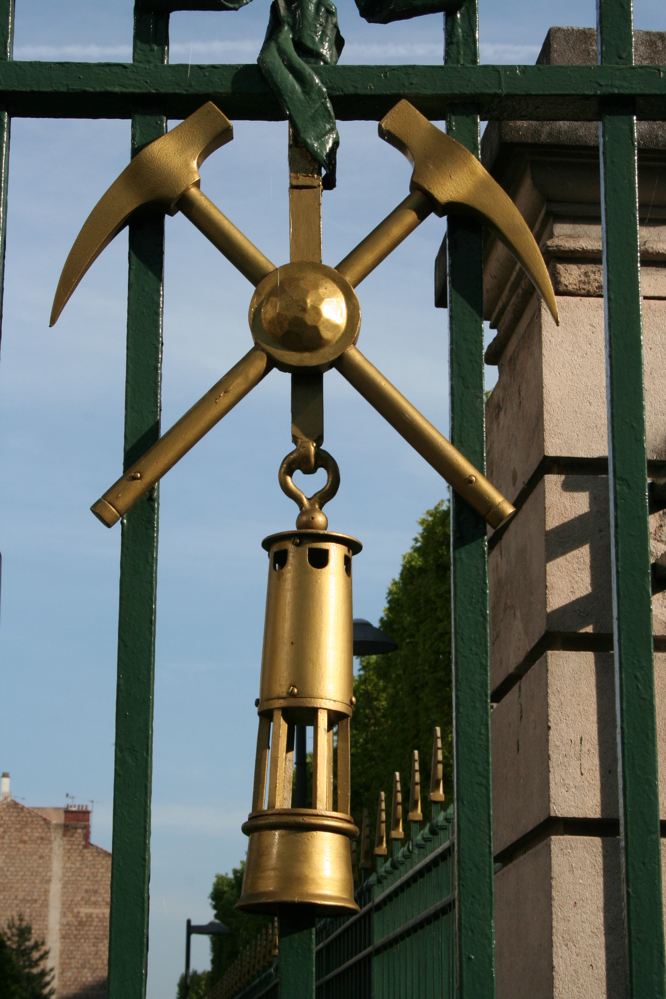 Ecole des Mines à Saint-Etienne (Loire, France)